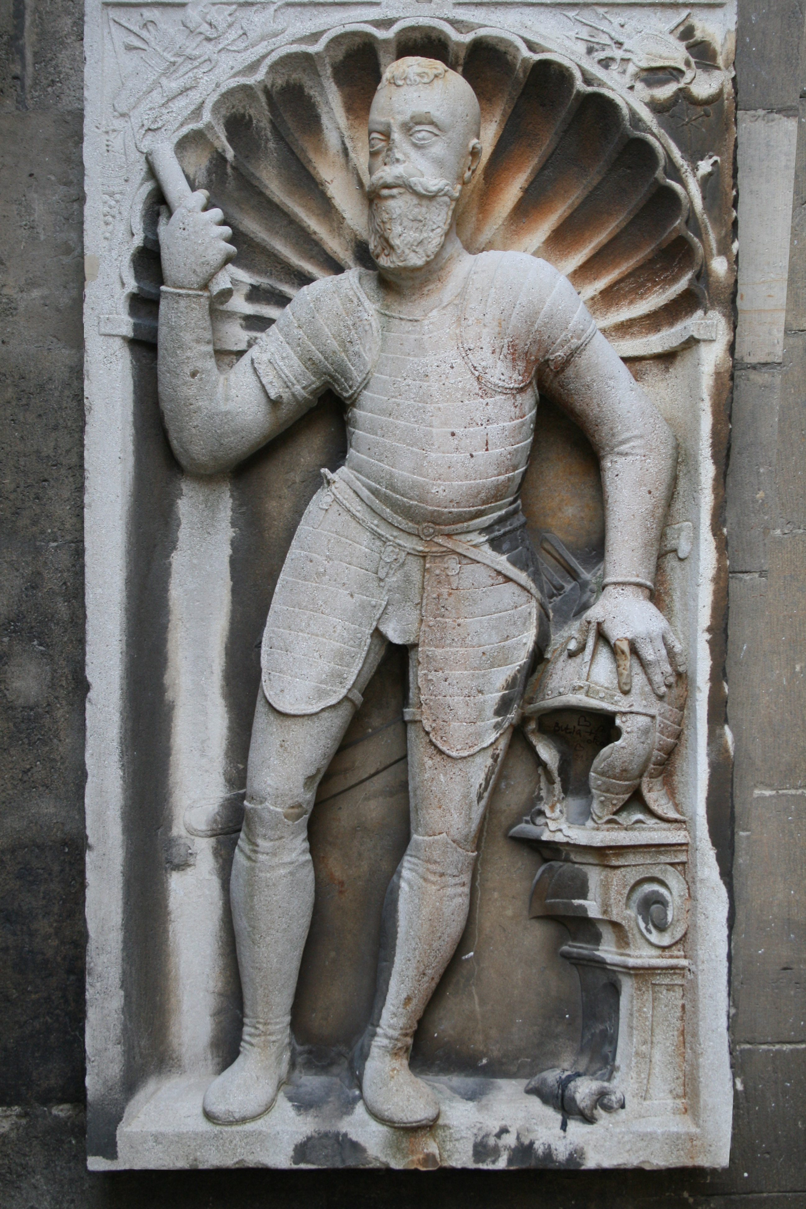 Pieskovcový epitaf Jána Draškoviča osadený pri severnom múre katedrály nad vstupom do hrobky Pálfiovcov. Jeho autormi v roku 1613 boli Gašpar Menneler a Paul Mayer. Ján II. Draškovič bol chorvátskym bánom a hlavným kapitánom Zadunajska. Známy bojovník proti Turkom získal v roku 1592 titul baróna. S manželkou Evou rod. Istvánfy mali dvoch synov. Starší Ján (III.) bol tiež vojakom, získal titul grófa a zastával úrad chorvátskeho, dalmátskeho a slavónskeho bána a napokon v roku 1646 aj funkciu uhorského palatína. Oženil sa s Barborou Turzovou, dcérou palatína Juraja Turzu a Alžbety Coborovej. Zomrel v roku 1648 a pochovali ho v Dóme sv. Martina. Mladší Juraj (II.) bol pécsskym biskupom a bratislavským prepoštom (v Bratislave dal postaviť budovu prepoštstva na dnešnej Kapitulskej ulici). Zomrel vo Viedni v roku 1650